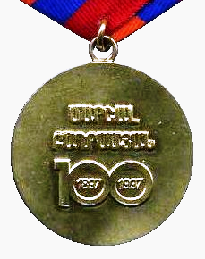 Медаль «Маршал Баграмян»